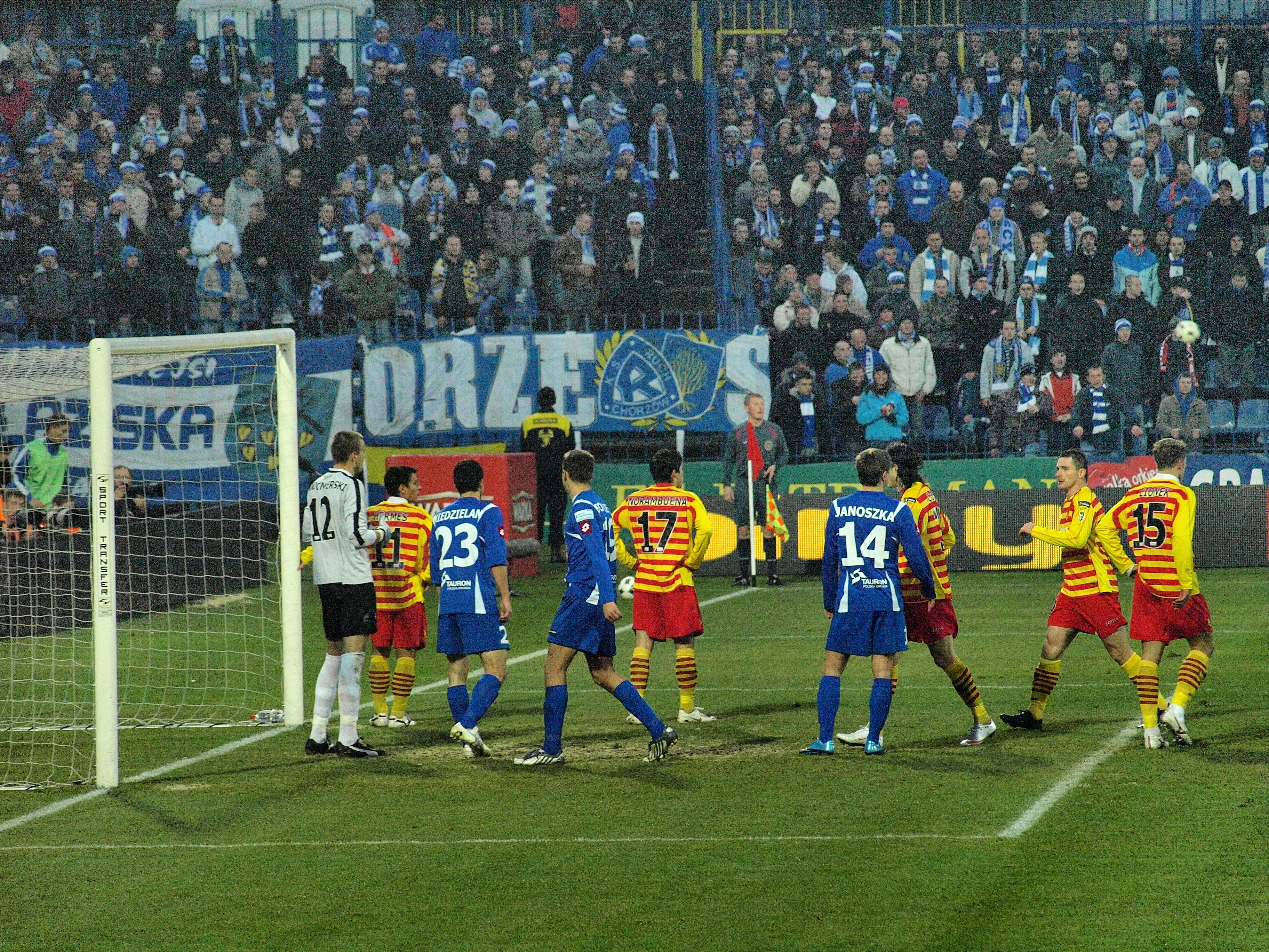 Mecz ekstraklasy Ruch-Jagiellonia z 9.11.2009.